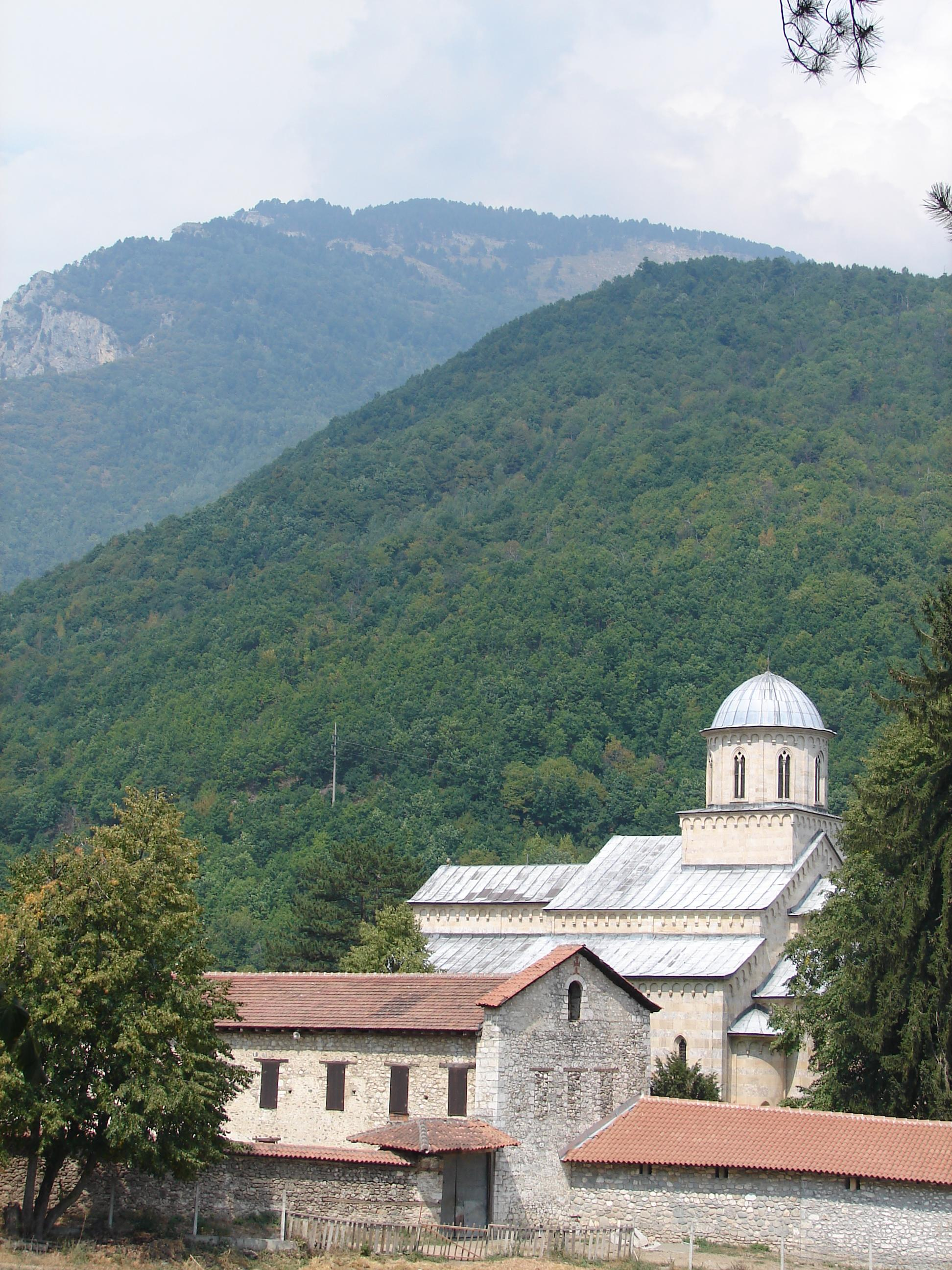 Visoki Dečani monastery.